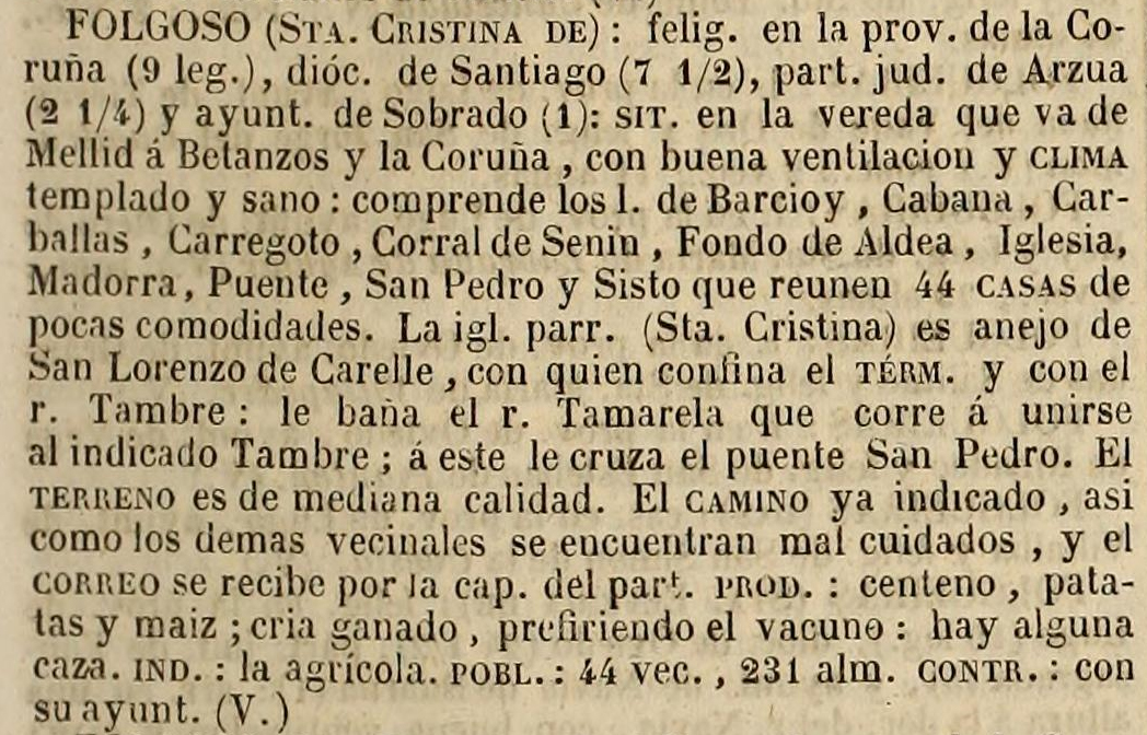 Folgoso no Diccionario geográfico-estadístico-histórico de España y sus posesiones de Ultramar.